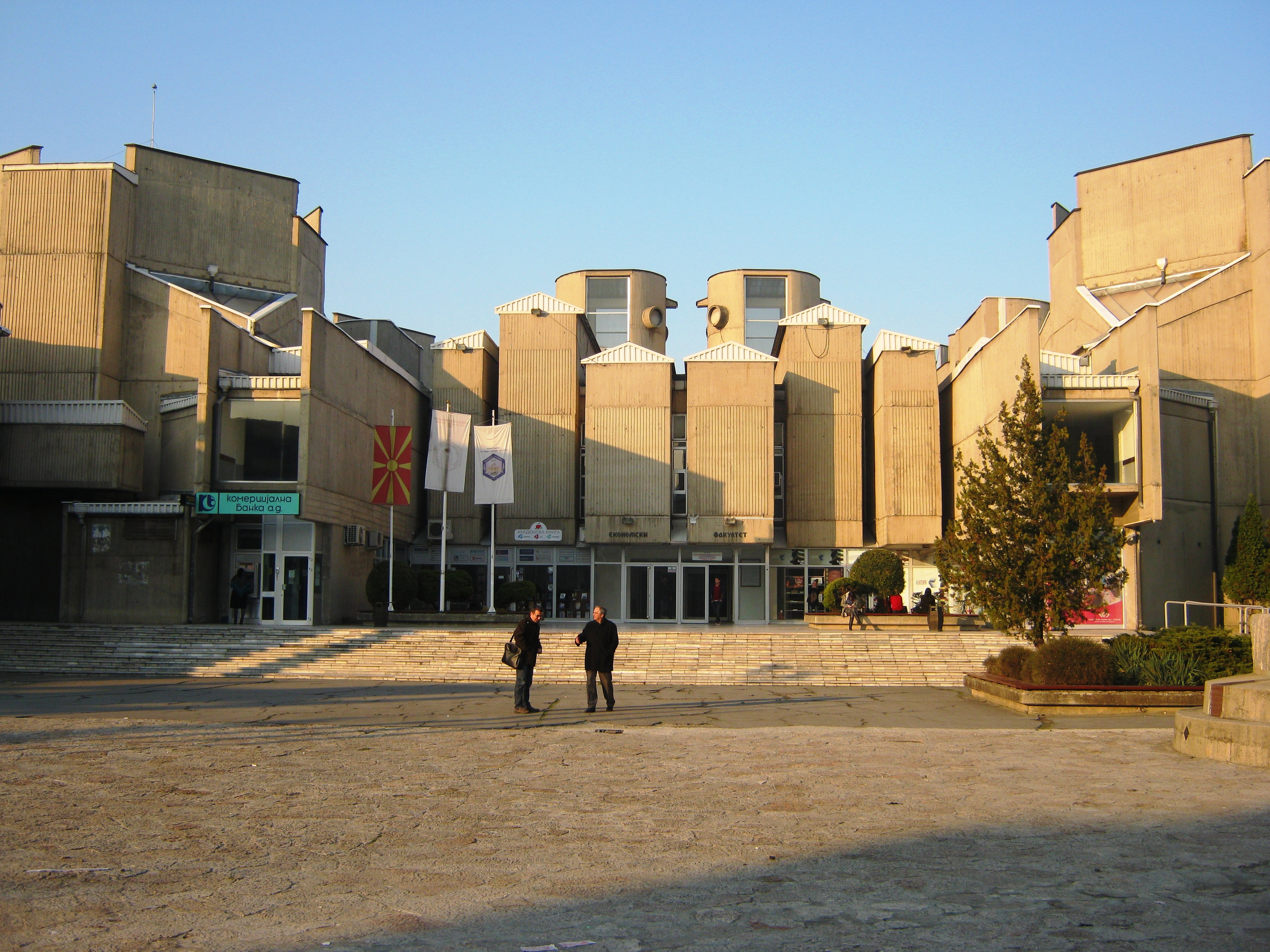 Економски факултет во Скопје